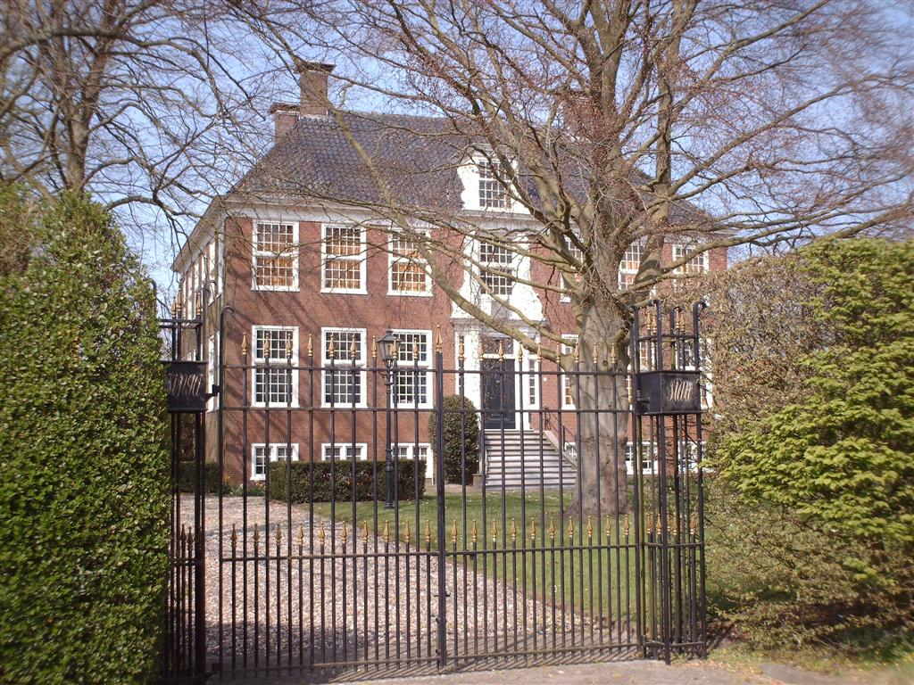 Osinga State in Langweer